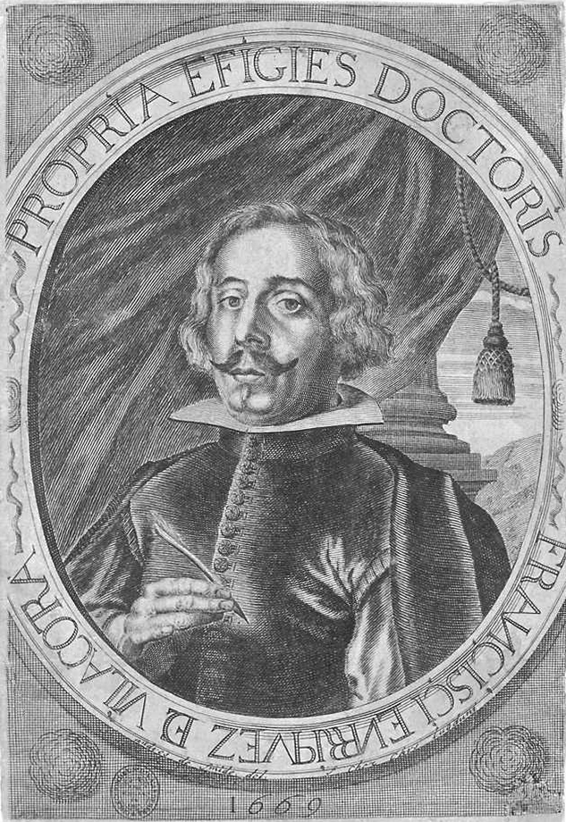 Francisco Enríquez (o Henríquez) de Villacorta (1616 - 1680) médico español, catedrático de la Universidad de Alcalá.